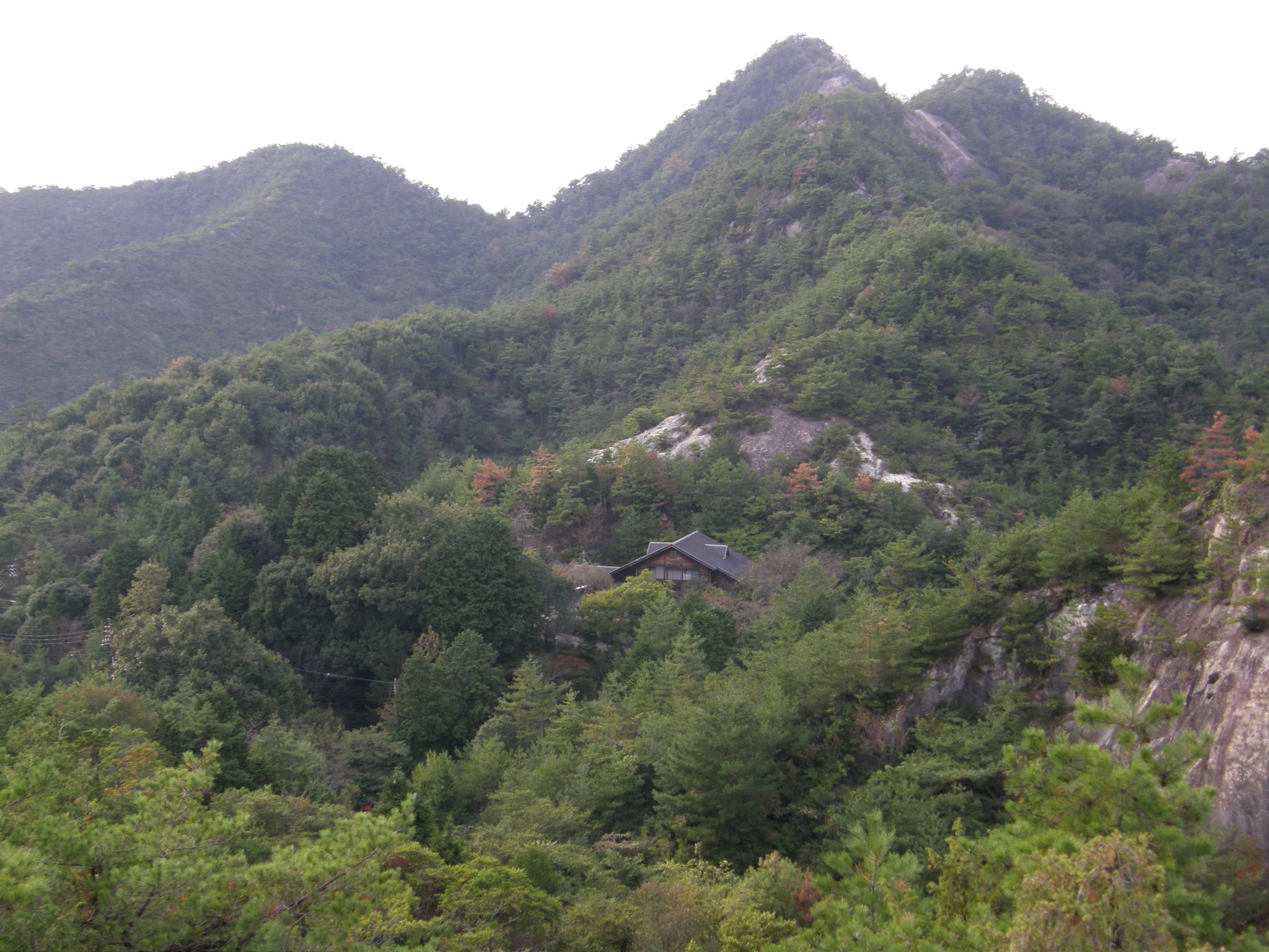 Mt.Kasamatsu Kasai-Furubokke-nature park 笠松山・古法華自然公園 加西市